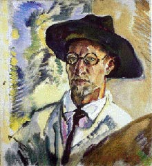 Self-portrait